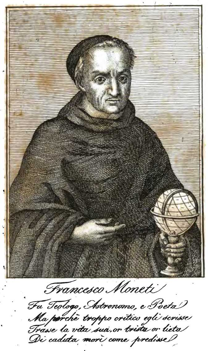 Francesco Moneti (1635-1712)